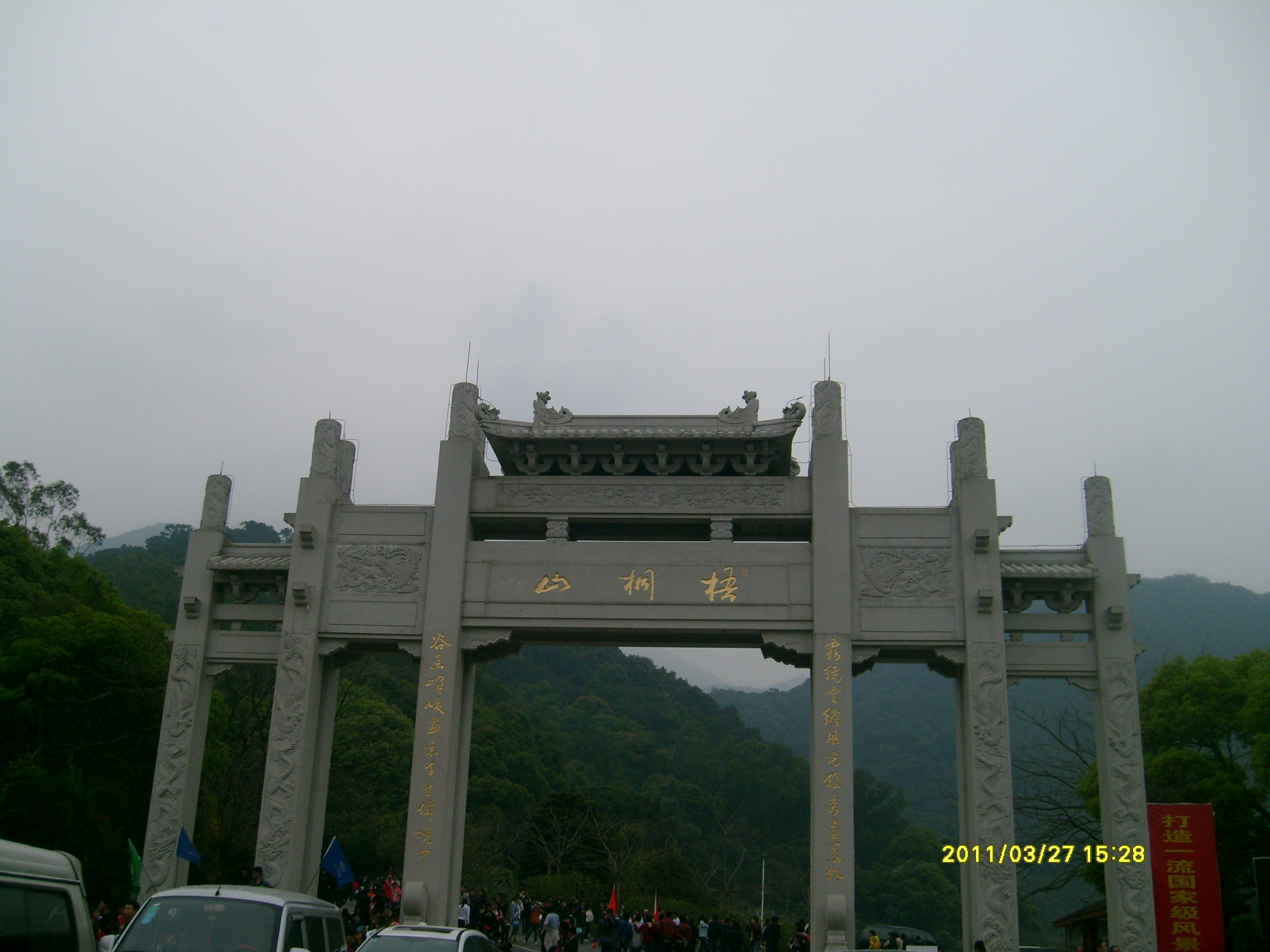 深圳梧桐山大门牌坊